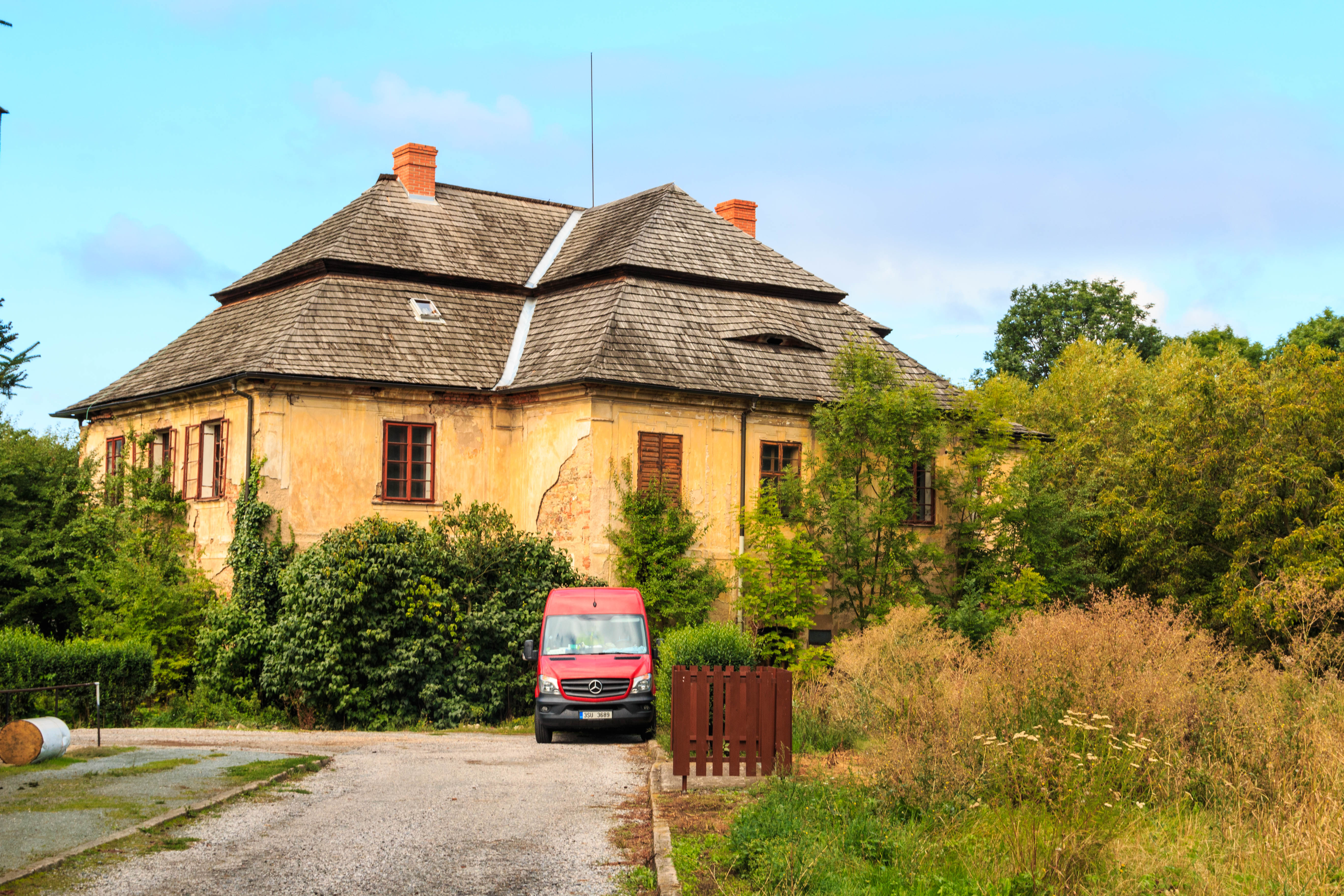 Fara, Svinčany 1, Svinčany.